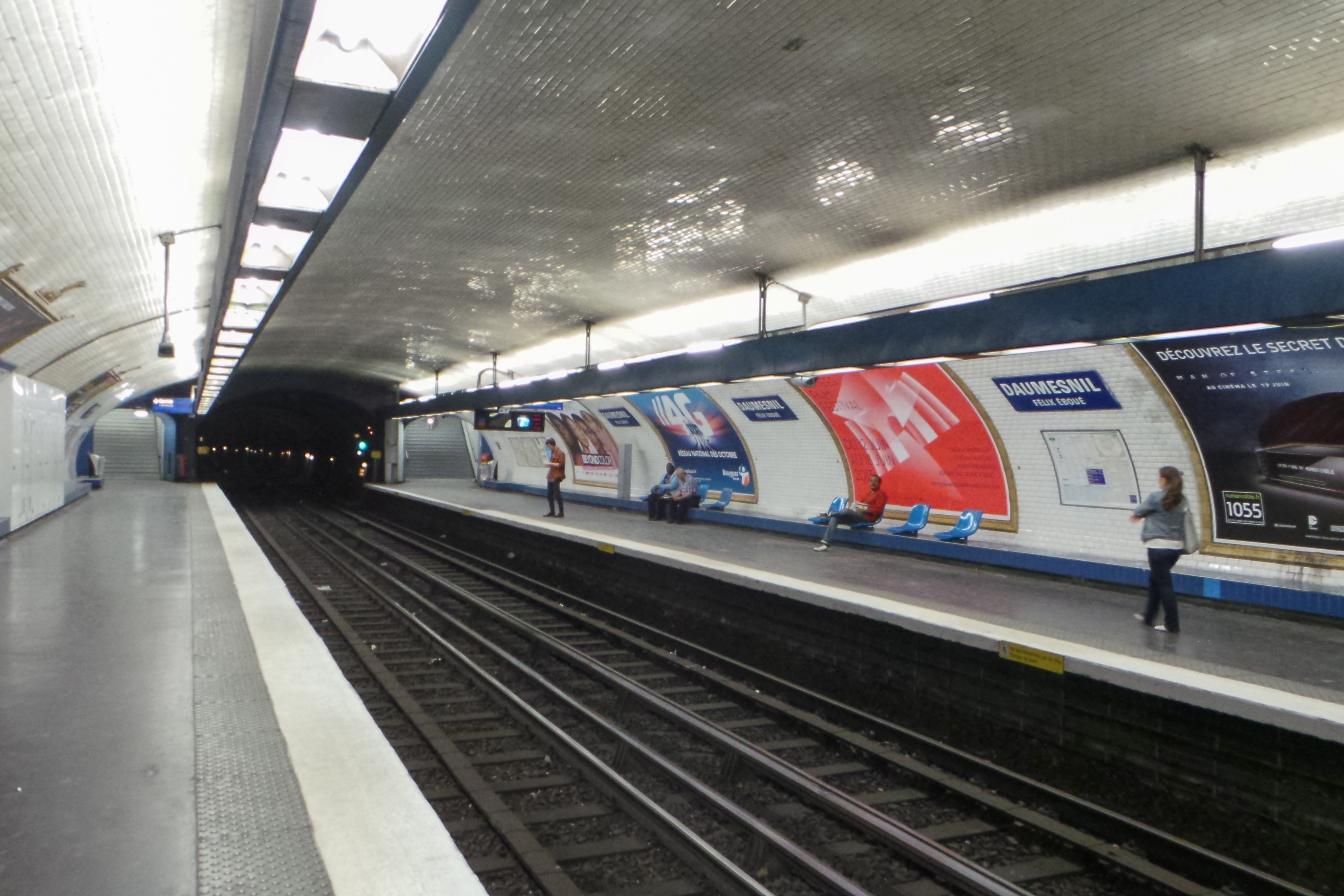 Station de métro Daumesnil, ligne 8 du métro de Paris - Paris, France